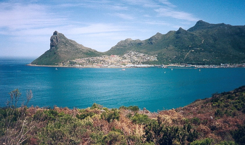 Copyright : FC Georgio Sujet: Péninsule du Cap, Chapman's peak, Afrique du Sud Date : octobre 1998